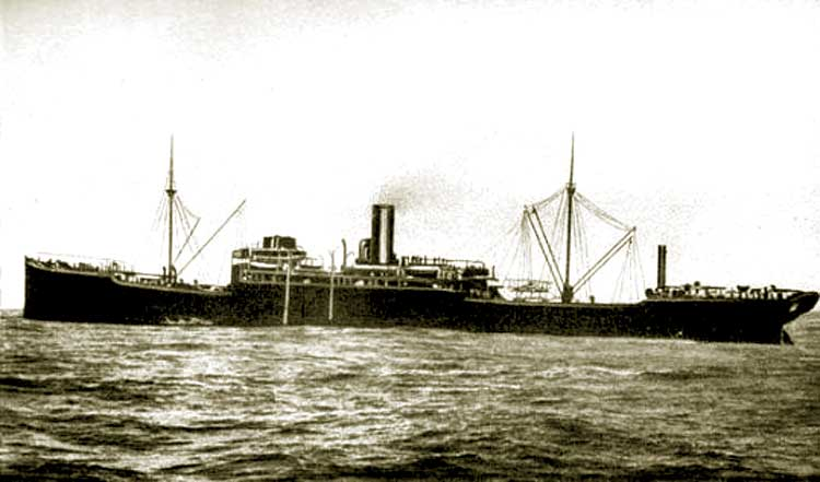 Der deutsche Hilfskreuzer Wolf ex Wachtfels